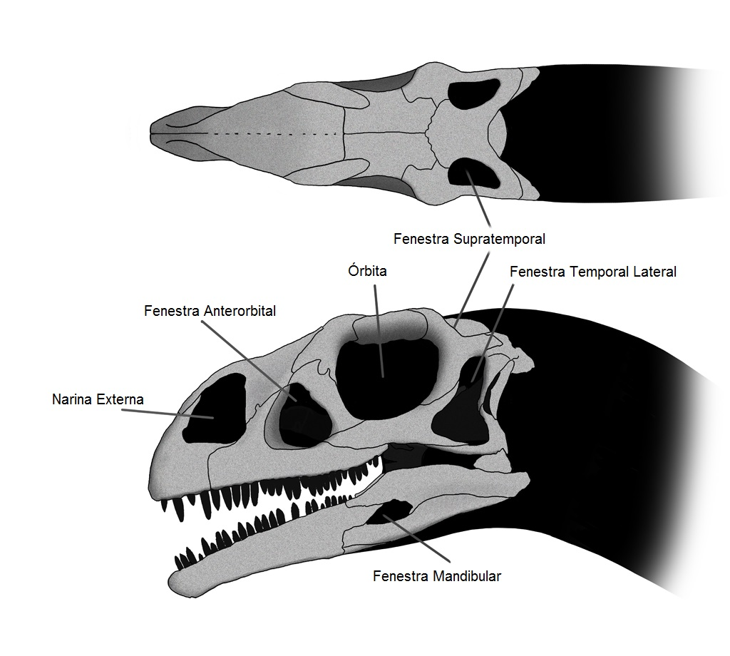 Diagrama do crânio do Massospondylus mostrando os vários buracos no crânio (ou fenestras).